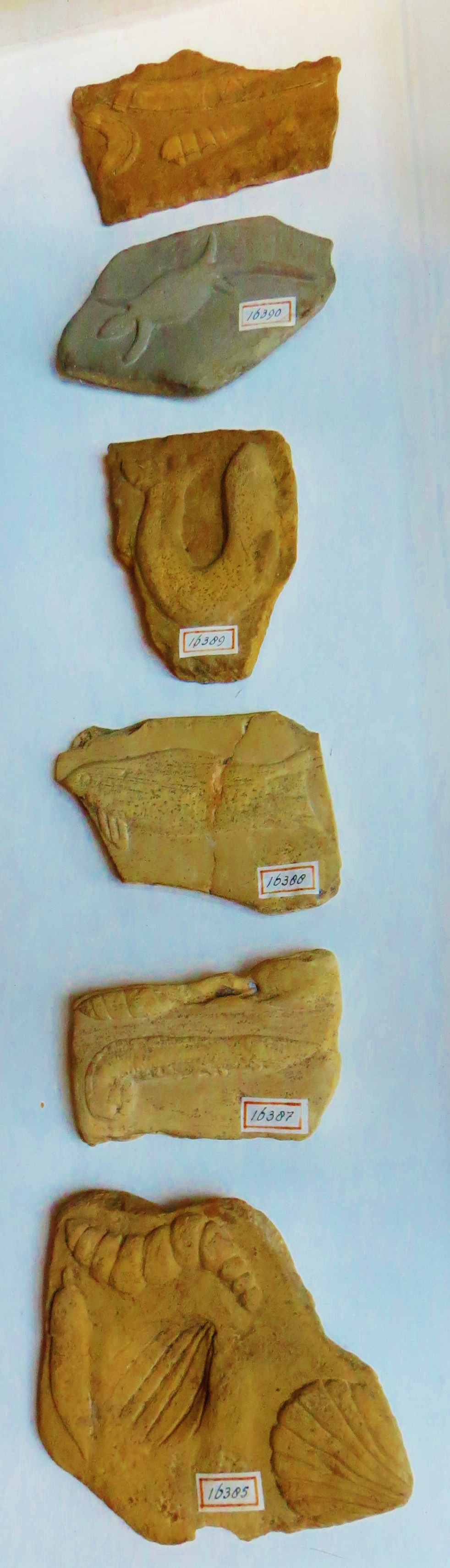 Pseudo-fossils Beringer- Took the picture at Teylers Museum, Haarlem